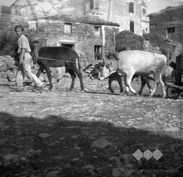 Vprega, osel in dve kravi, Tinjan.